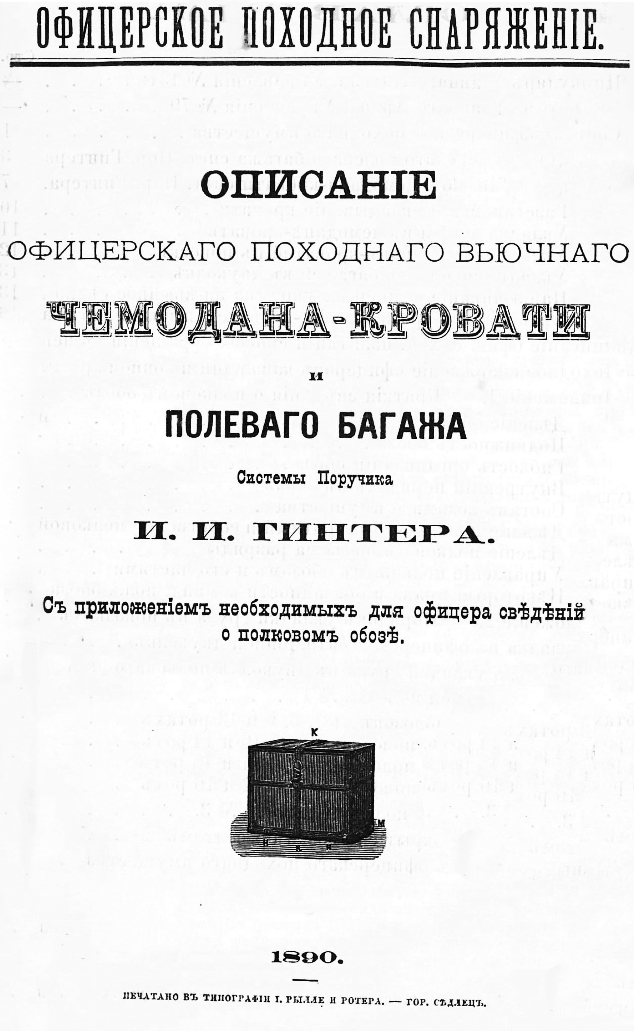 Kovrilo de broŝuro de Jan Günther pri patentita faldebla valizo-lito.